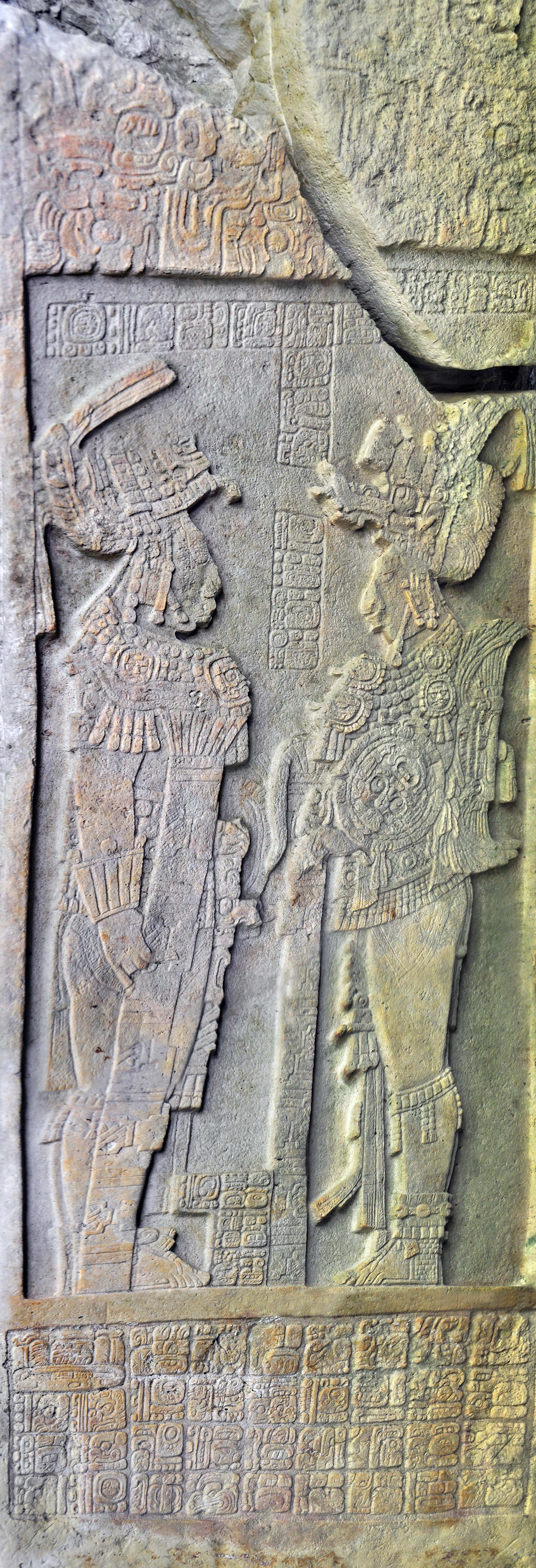 Parte frontal de la Estela 11 de Yaxchilán